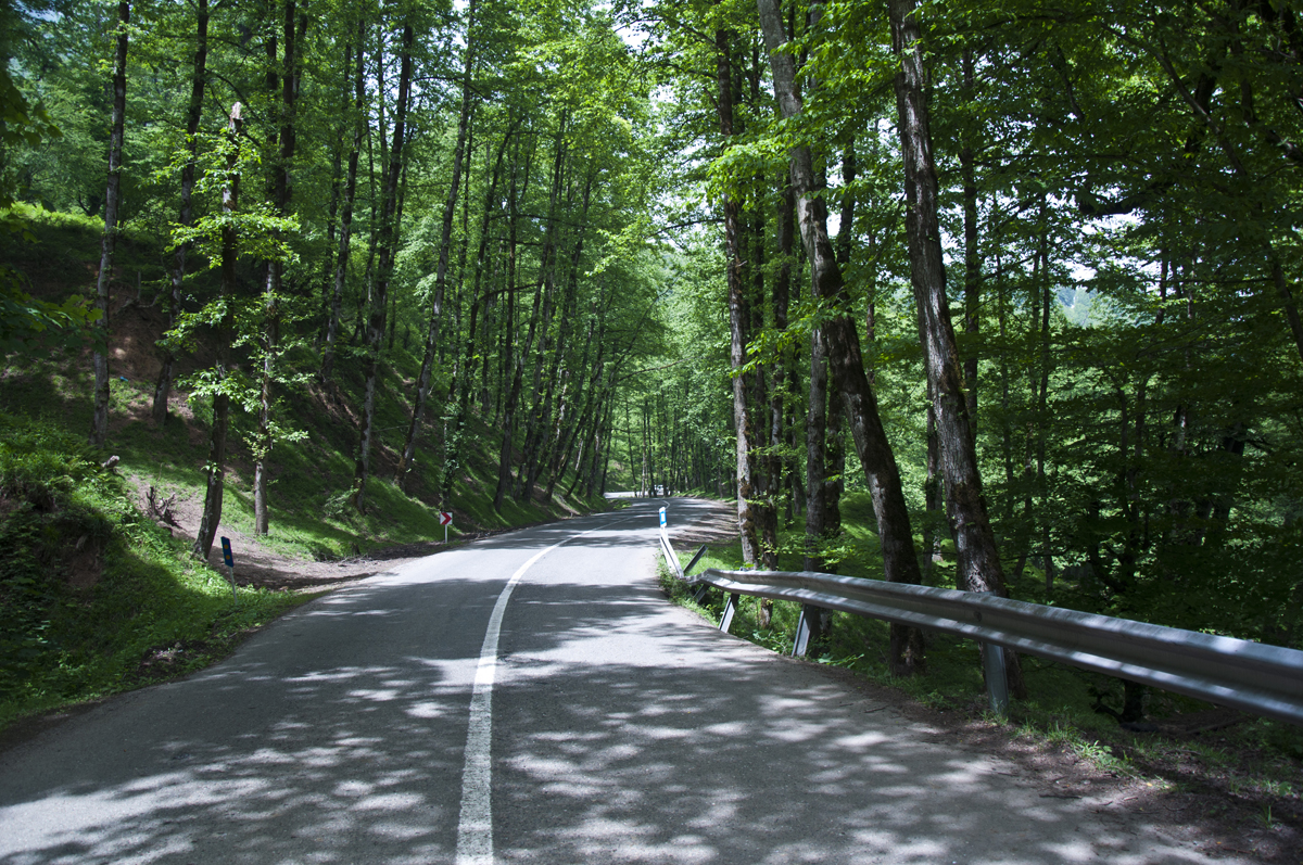 Mazandaran Province, Jannat Rudbar Rd, Iran